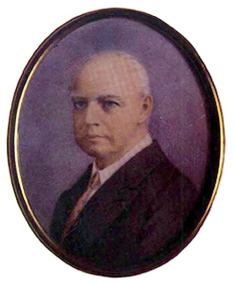 Pedro de Aycinena, presidente de Guatemala en 1865.